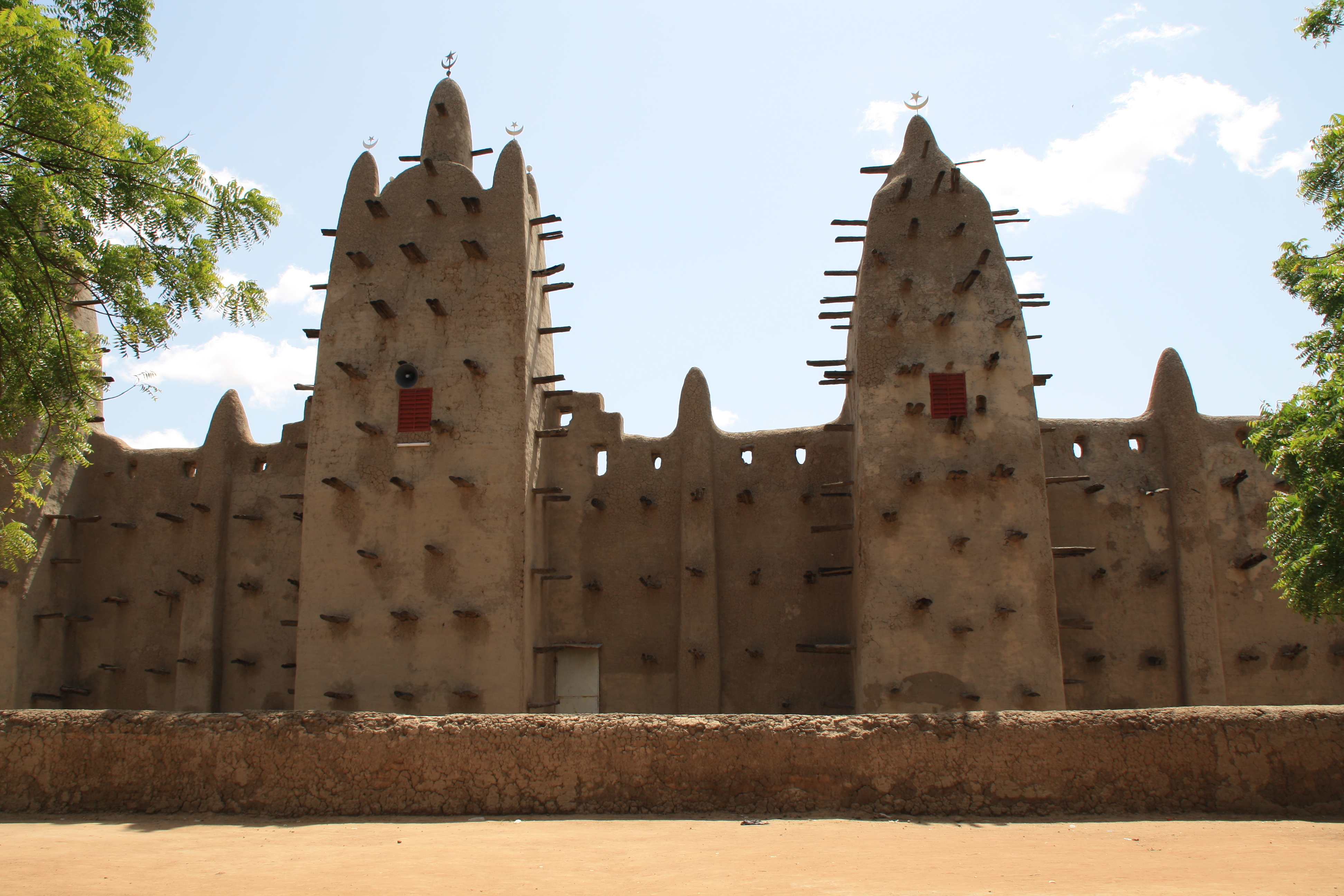 Mosquée de la ville de San (Mali), architecture soudanaise de banco gris (2009)